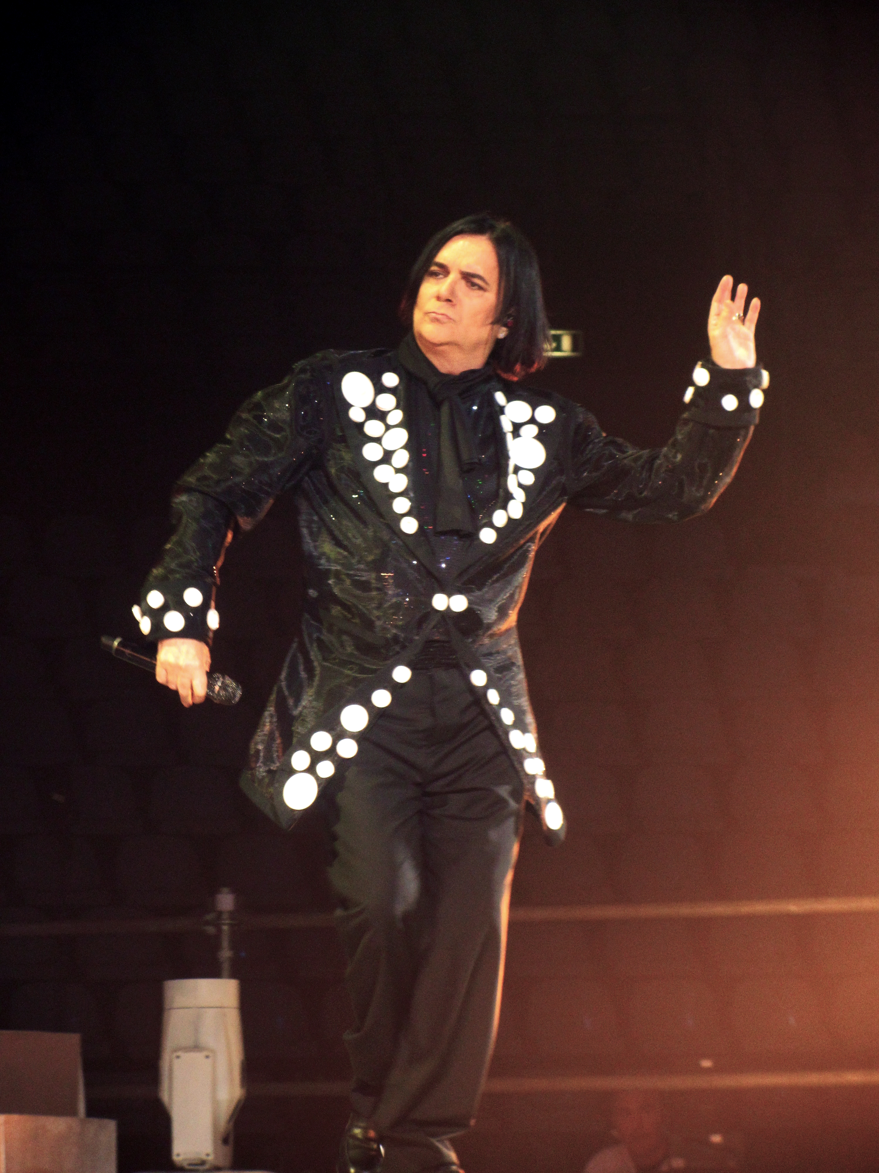 Una mia foto all'ultimo tour di Renato Zero.